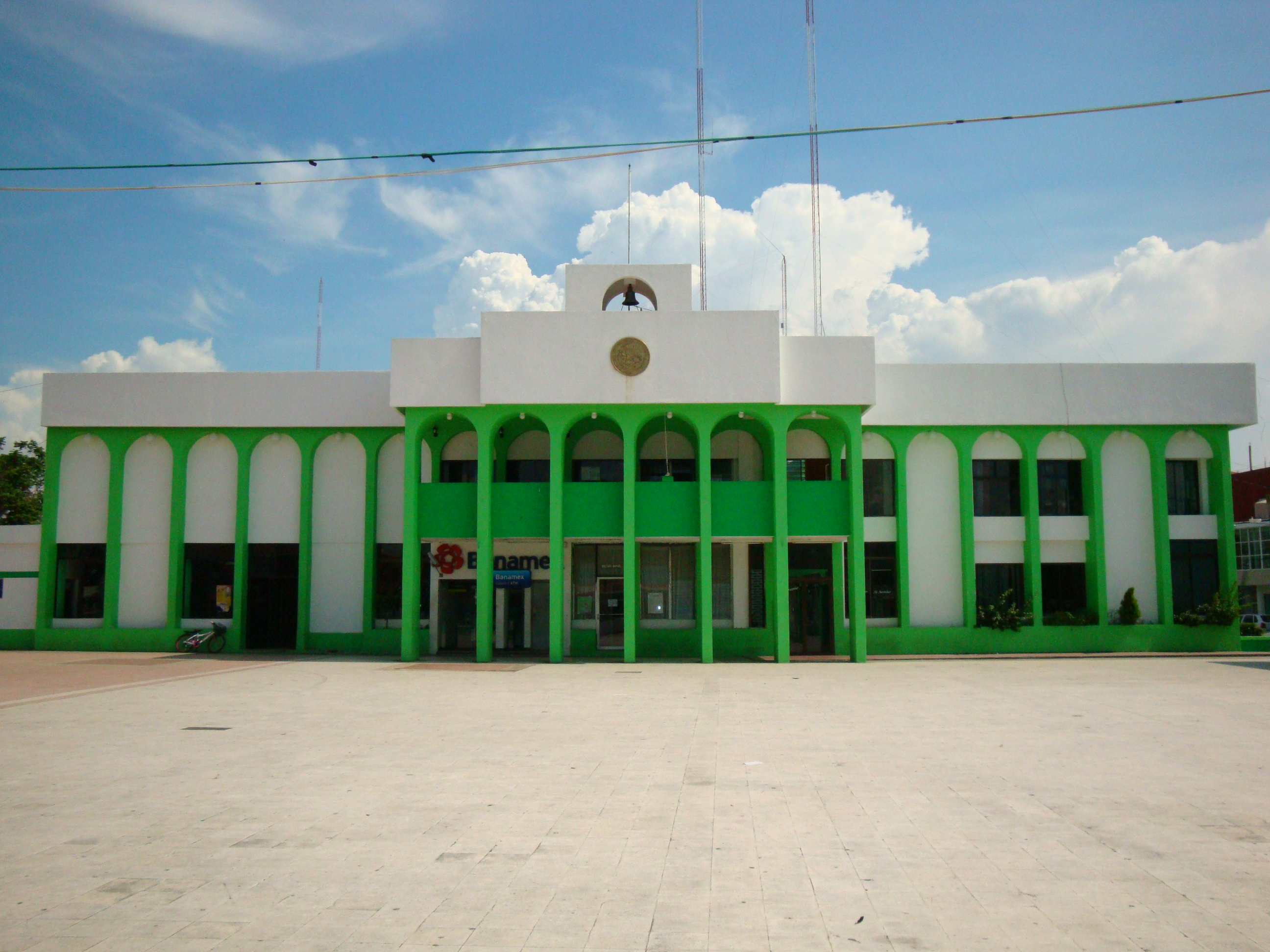 Palacio Municipal de Nacajuca, estado de Tabasco, México.